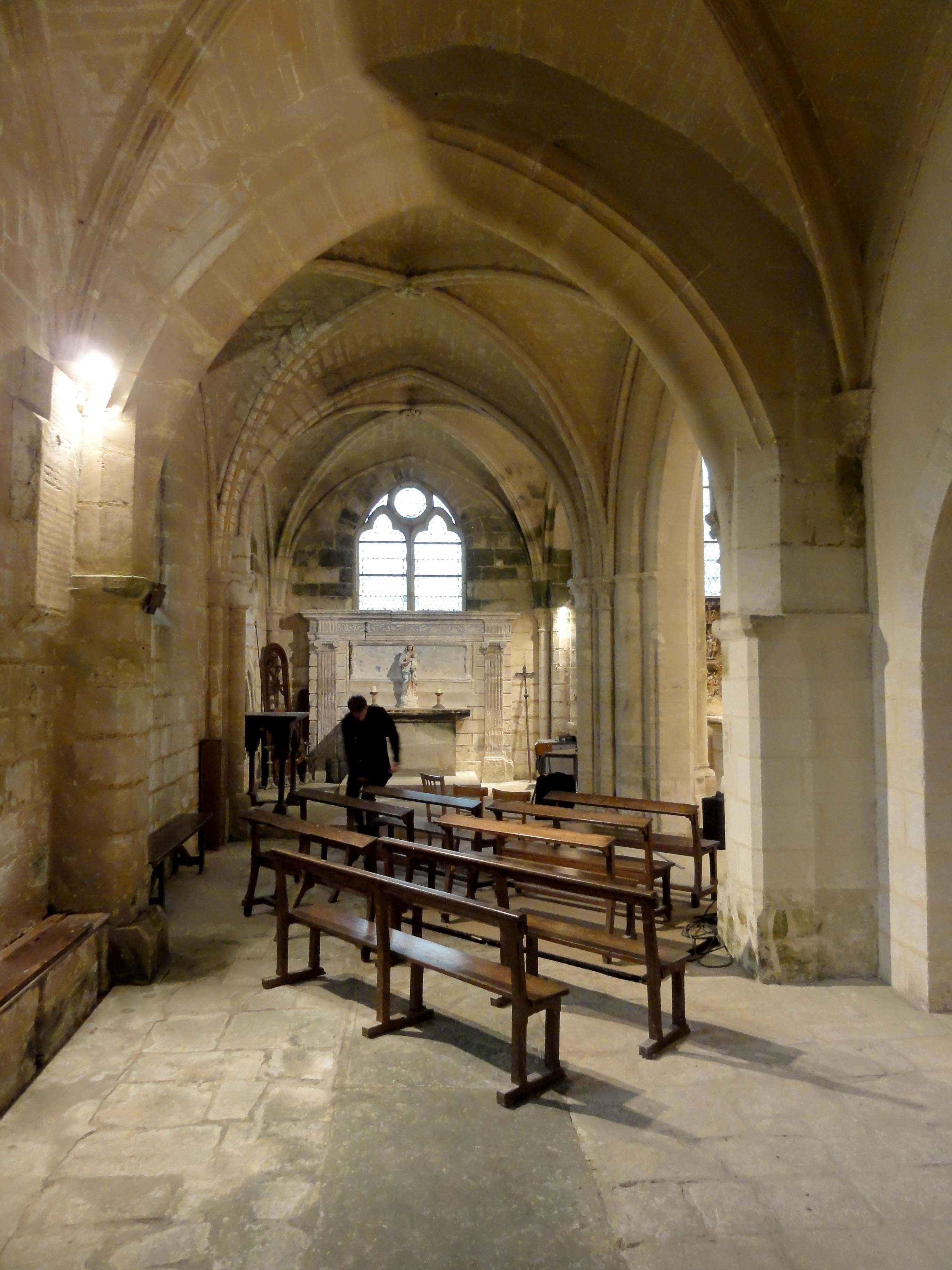 Intérieur de l'église - voir titre.